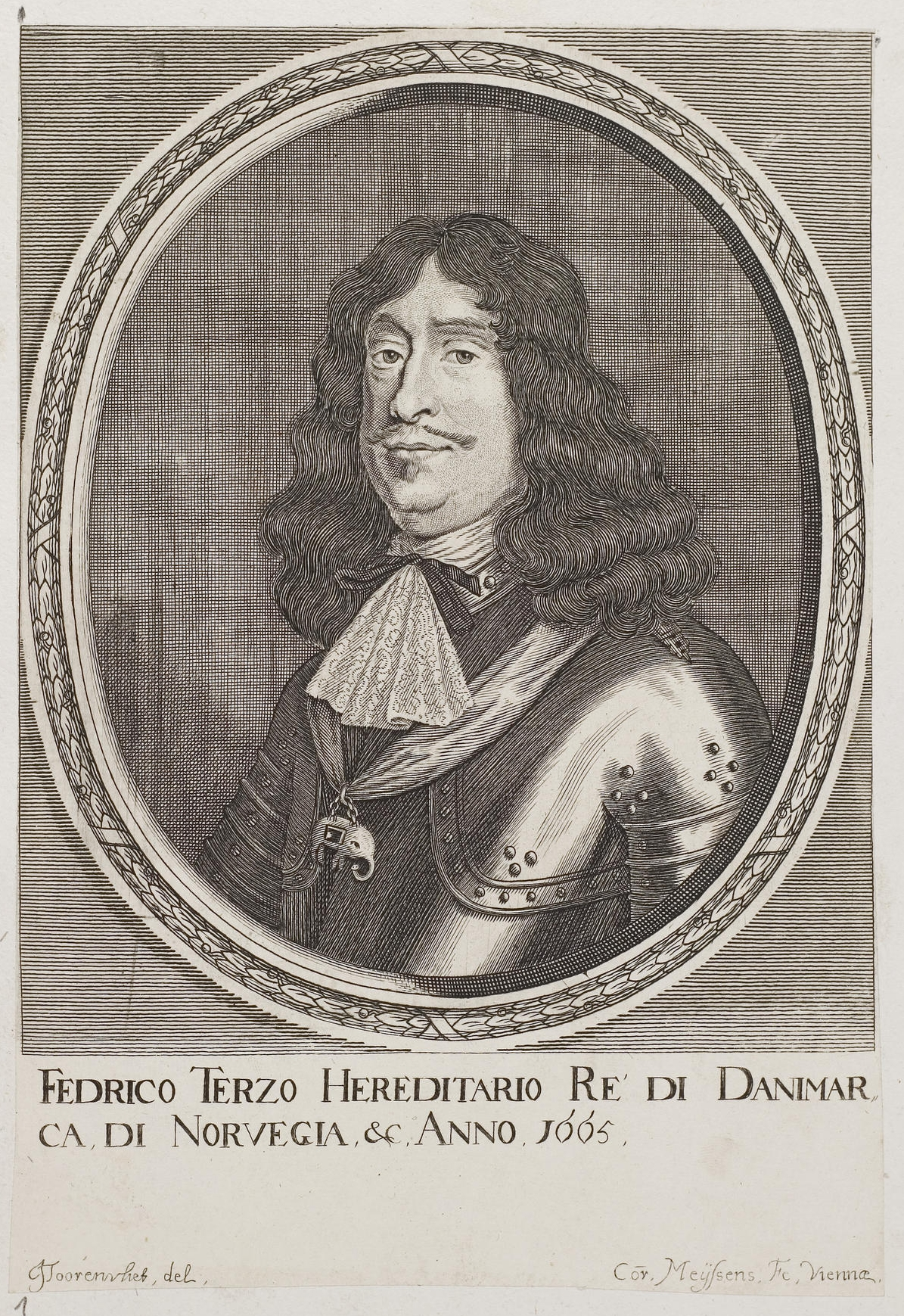 Grafik aus dem Klebeband Nr. 2 der Fürstlich Waldeckschen Hofbibliothek Arolsen Motiv: "Federico Terzo Hereditario Ré di Danimarca, di Norvegia etc. Anno 1665" (König Friedrich III. von Dänemark)